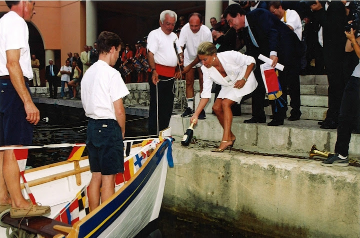 Baptême de Laïssa Ana, la yole de Bantry de Villefranche-sur-Mer, par la princesse Marina de Savoie